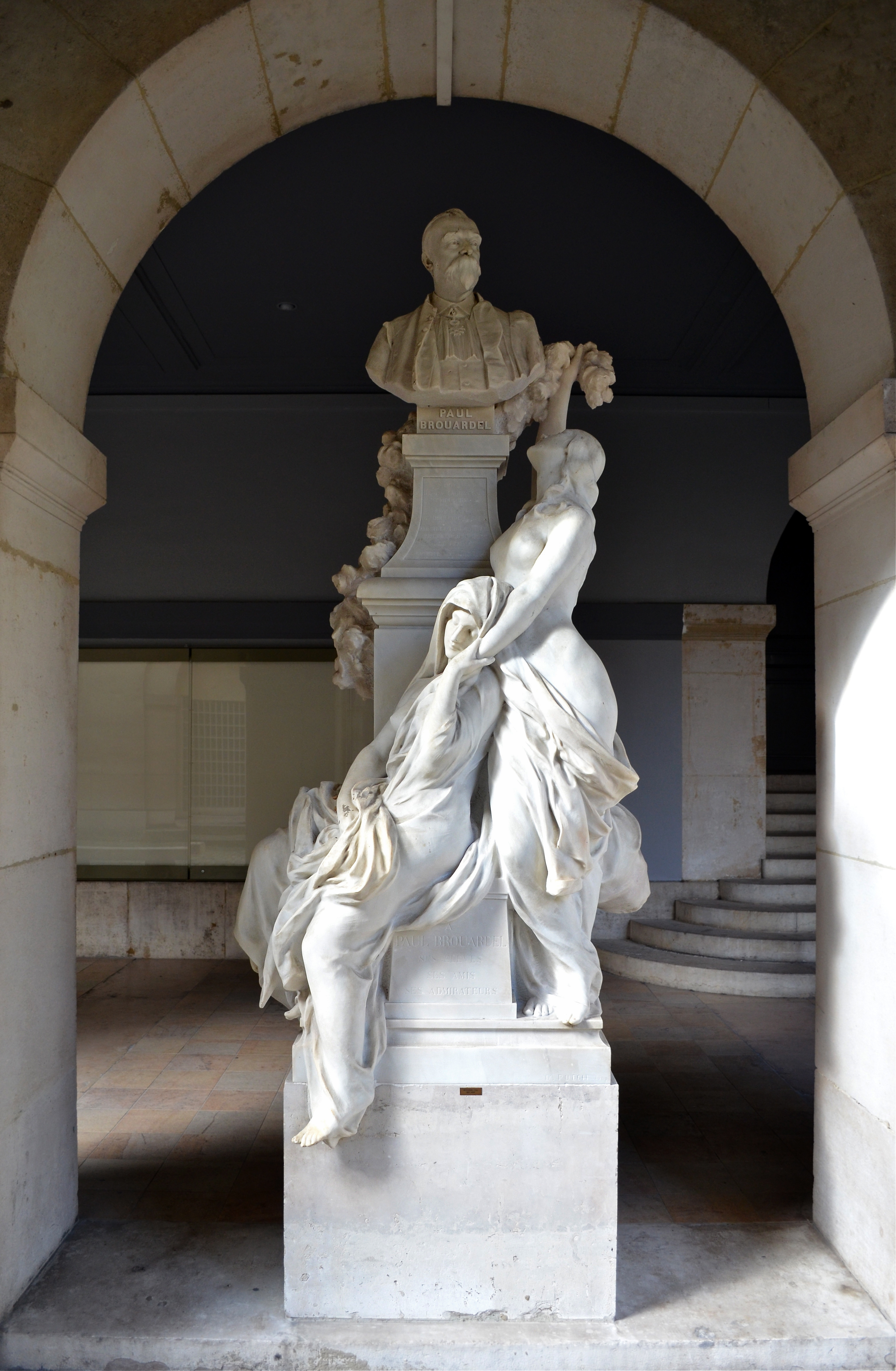 Monument dédié au Dr Paul Brouardel - Université de Paris VI Pierre et Marie Curie, 12 rue de l'école de Médecine, Paris.